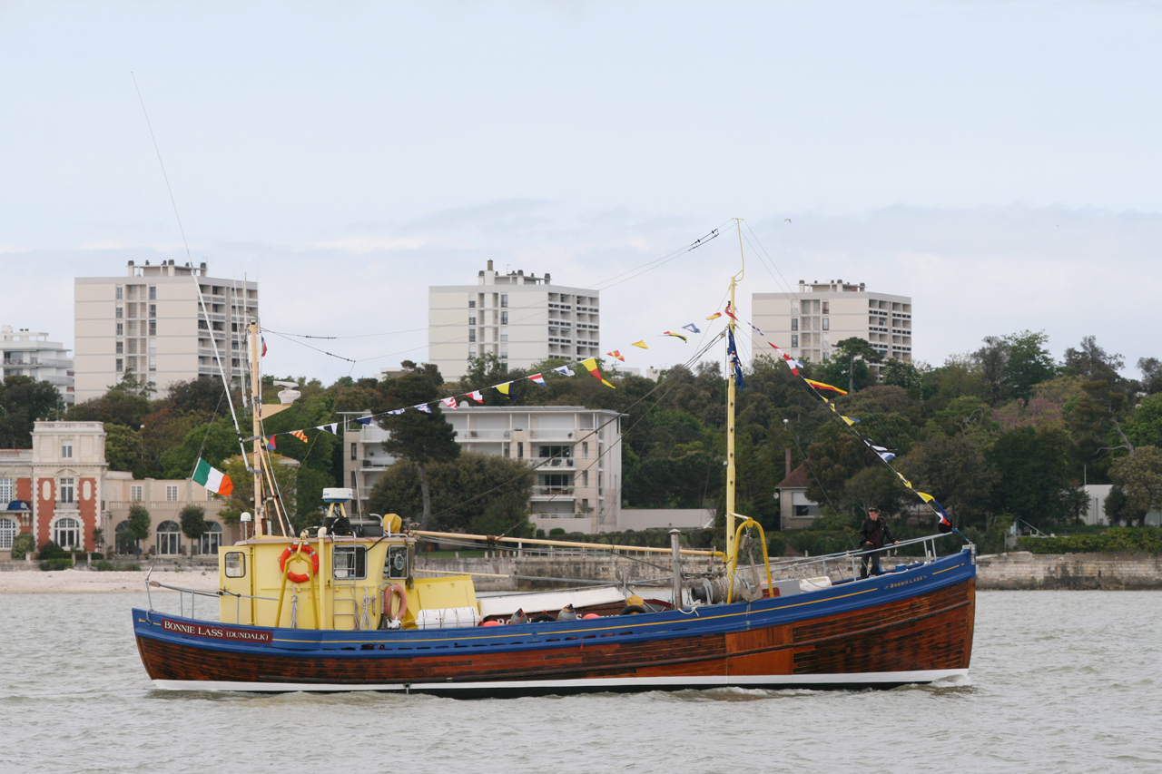 Le Bonnie Lass du musée maritime de La Rochelle